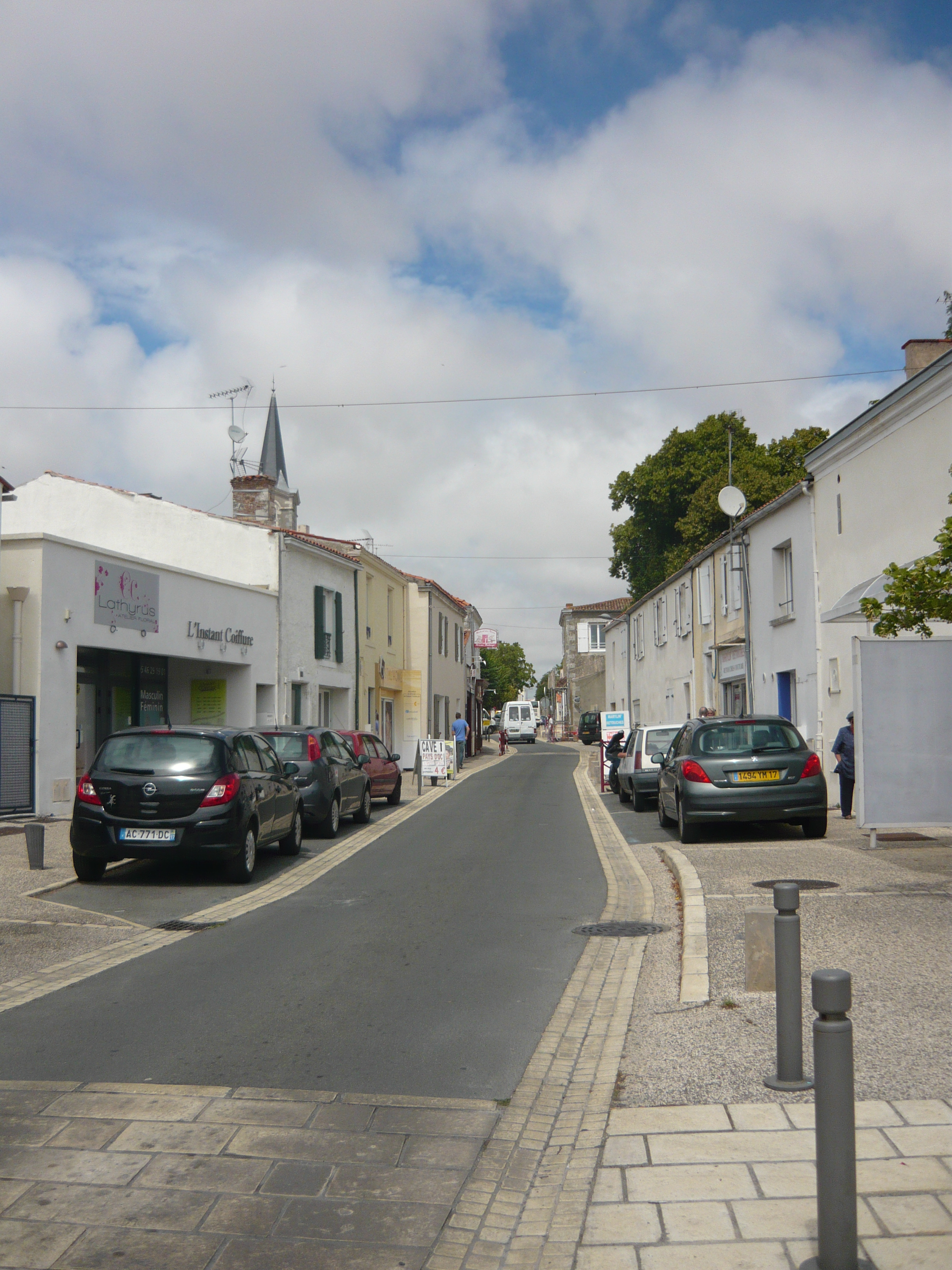 La rue de la Gare à Aytré a été aménagée au début du XXIe siècle.